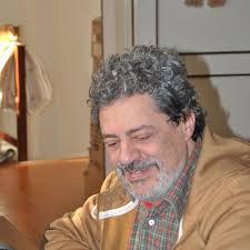 Pino Casamassima